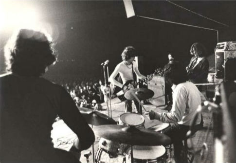 Almendra en vivo